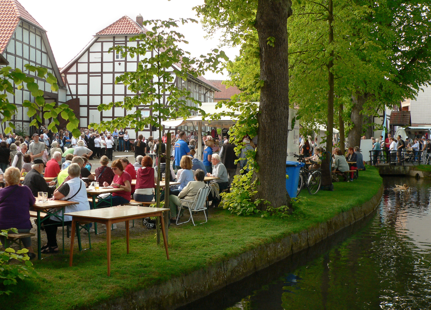 Schunterfest